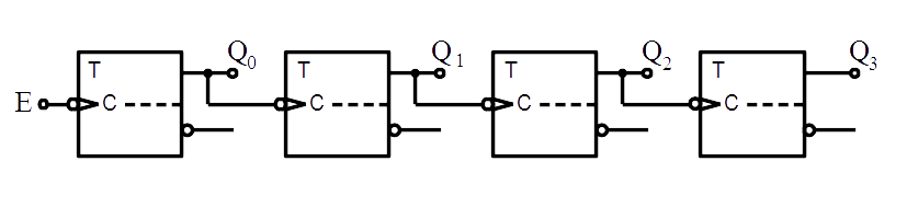 Binärteiler aus 4 T-Flopflops für fallende Flanke